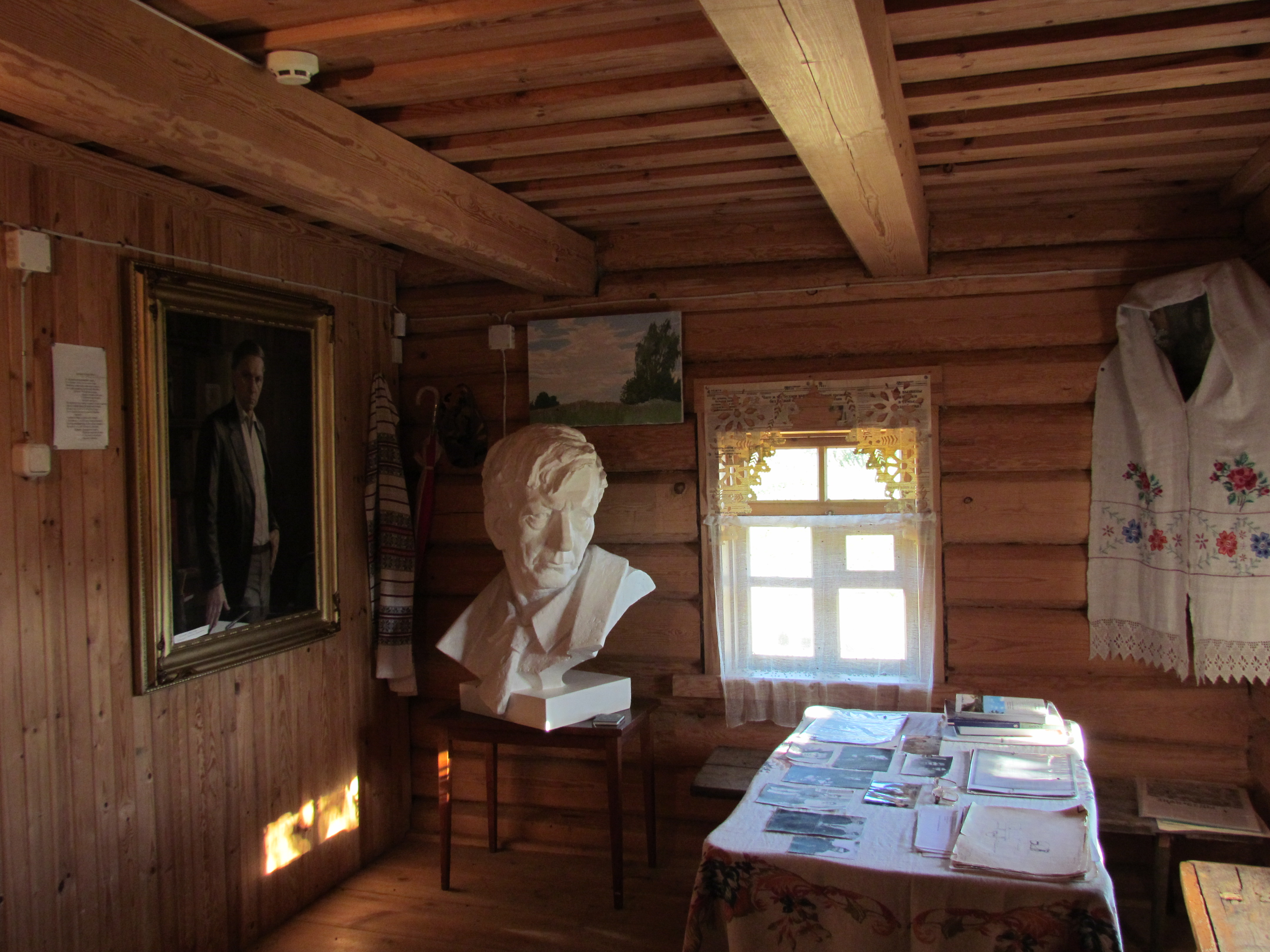 Беларуская (тарашкевіца): Вёска Бычкі. Сядзіба-музэй Васіля Быкава